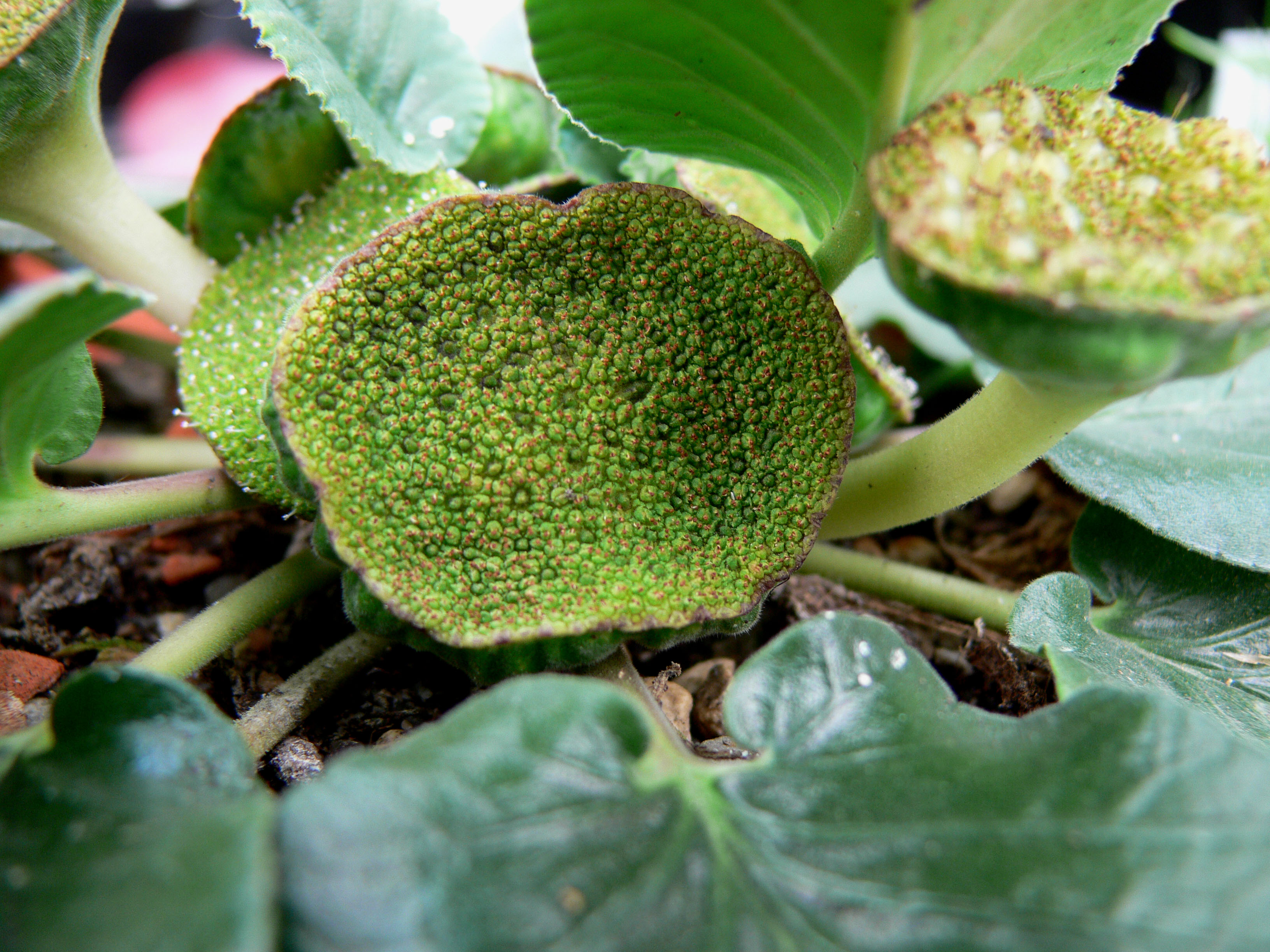 Dorstenia brasiliensis Lam. Familie Moraceae, Südamerika, Trinidad, Tobago. Aufnahme aus dem botanischen Garten der Ruhruniversität Bochum